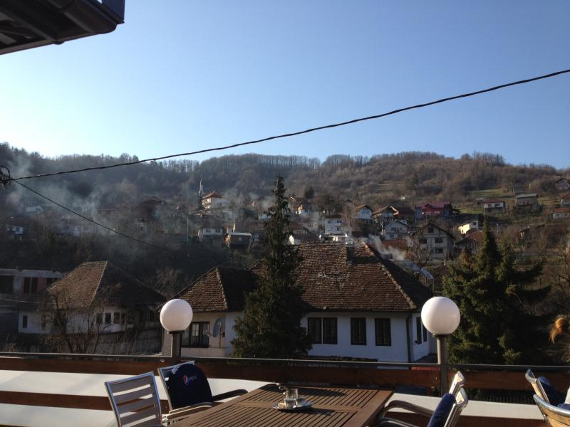 Ilidza - Banja Luka